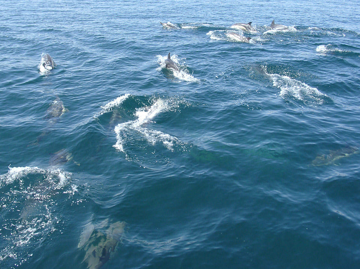 Description : Bande de dauphins près de la pointe de Penmarc'h Une bande exceptionnellement nombreuse d'une cinquantaine de dauphins - ils sont rarement plus d'une dizaine dans ce coin d'habitude - sont venus à la rencontre de notre bateau pour jouer avec l'étrave puis, avoir fait le tour de ce nouveau jouet, sont repartis vers ce qui était visiblement une zone abondemment pourvue de poissons à voir les fous de bassan tourner et piquer au dessus de la joyeuse bande Lieu : Pointe de Penmarc'h Bretagne, France Date : 2002? Auteur : Pline Photo personnelle